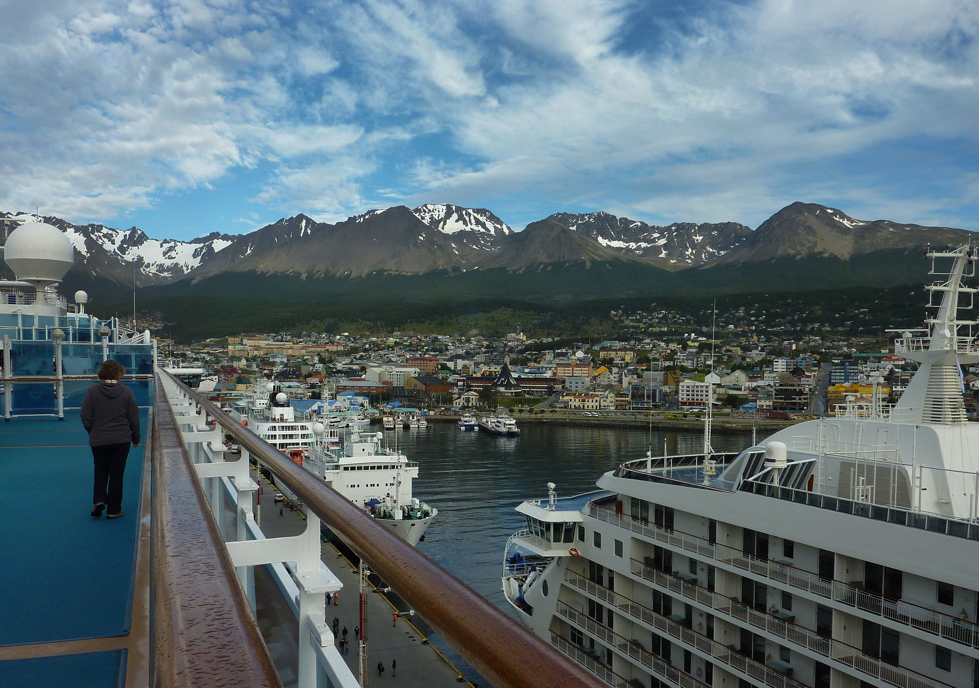 Antarctic Cruise: Ushuaia Patagonia Mountains.